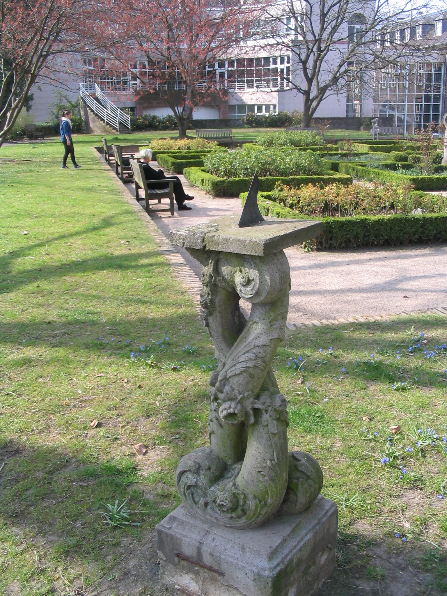 Düsseldorf, Spee'scher Park. Eine von zwei barocken Sonnenuhren.